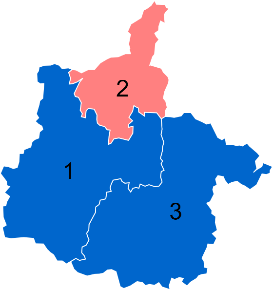 Résultats des élections législatives des Ardennes en 2012